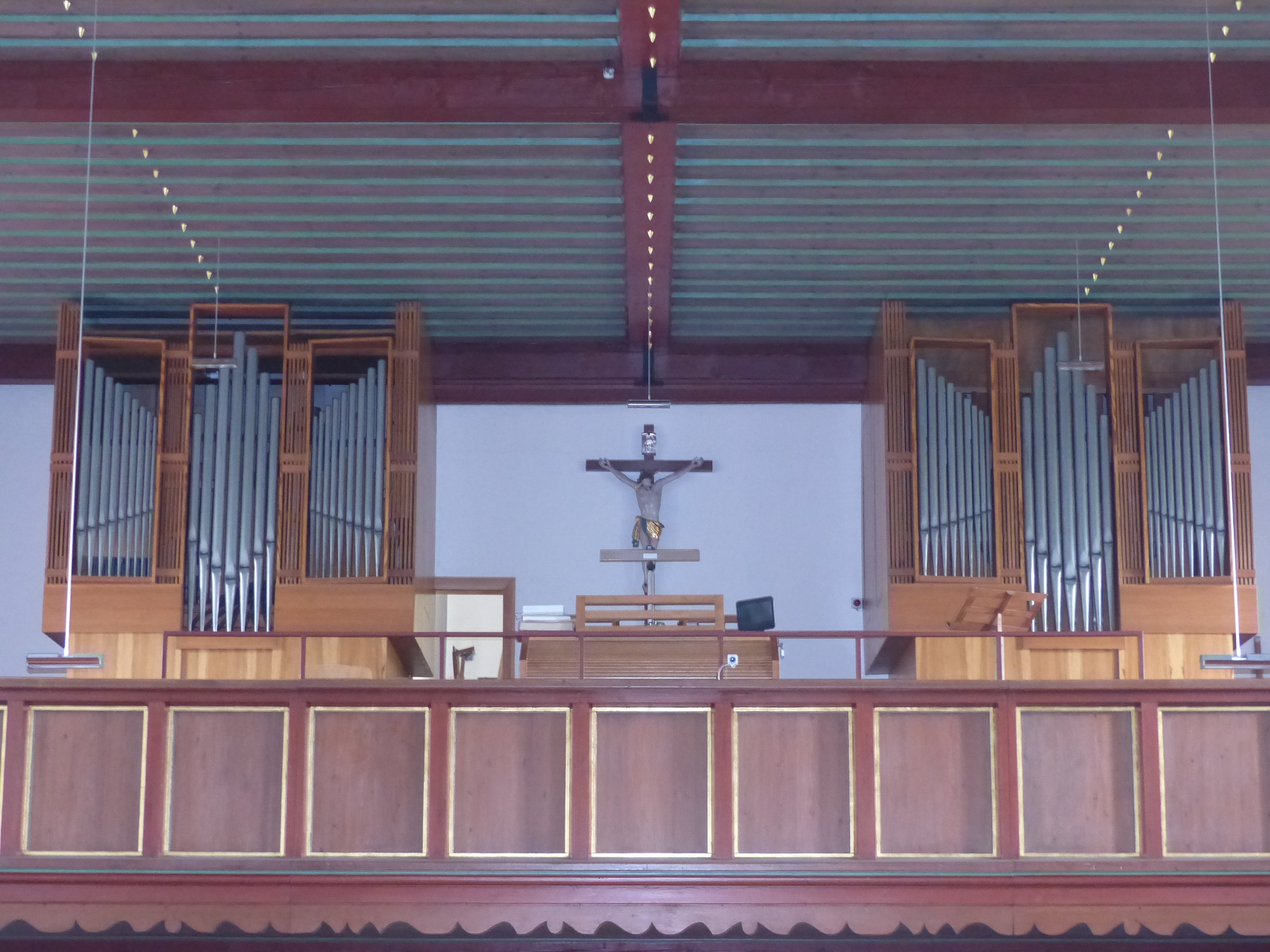 Ansicht der Orgel vom Kirchenschiff aus